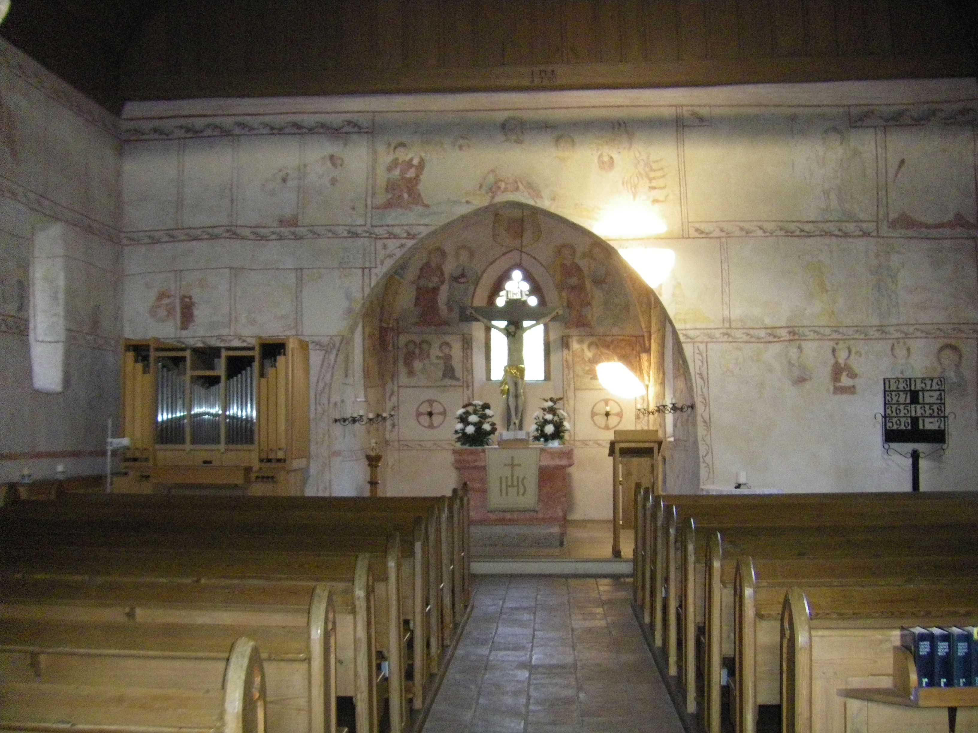 Innenansicht der Gottesruhkapelle Windsbach